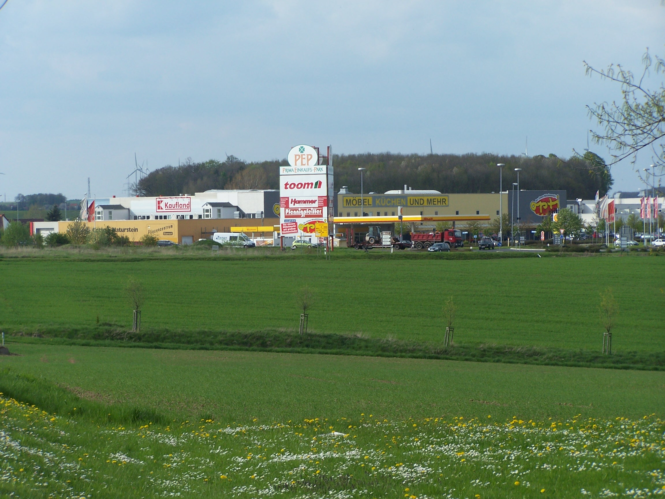 Hoetzelsroda, PEP